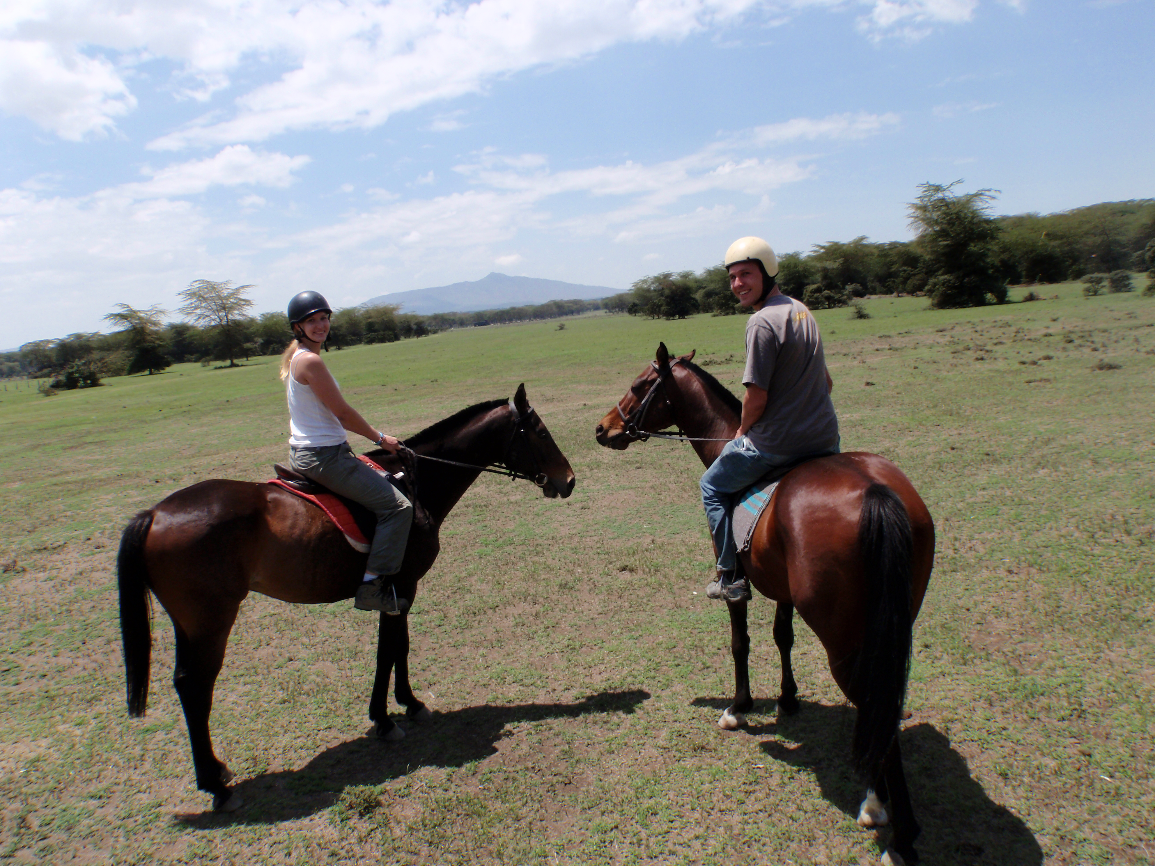 Horseback Safari in Kenya